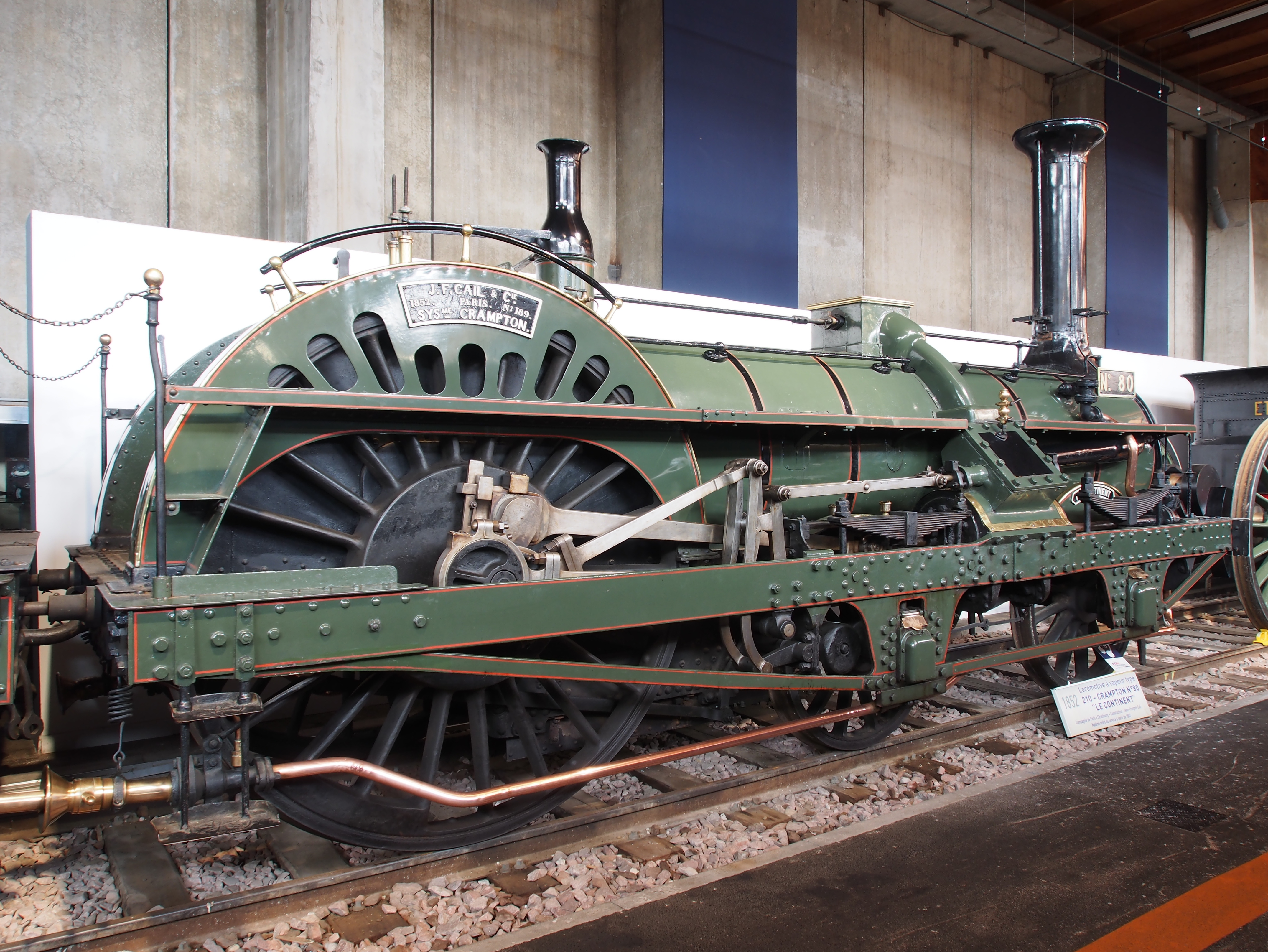 Photographed at Cité du train, Mulhouse, France.